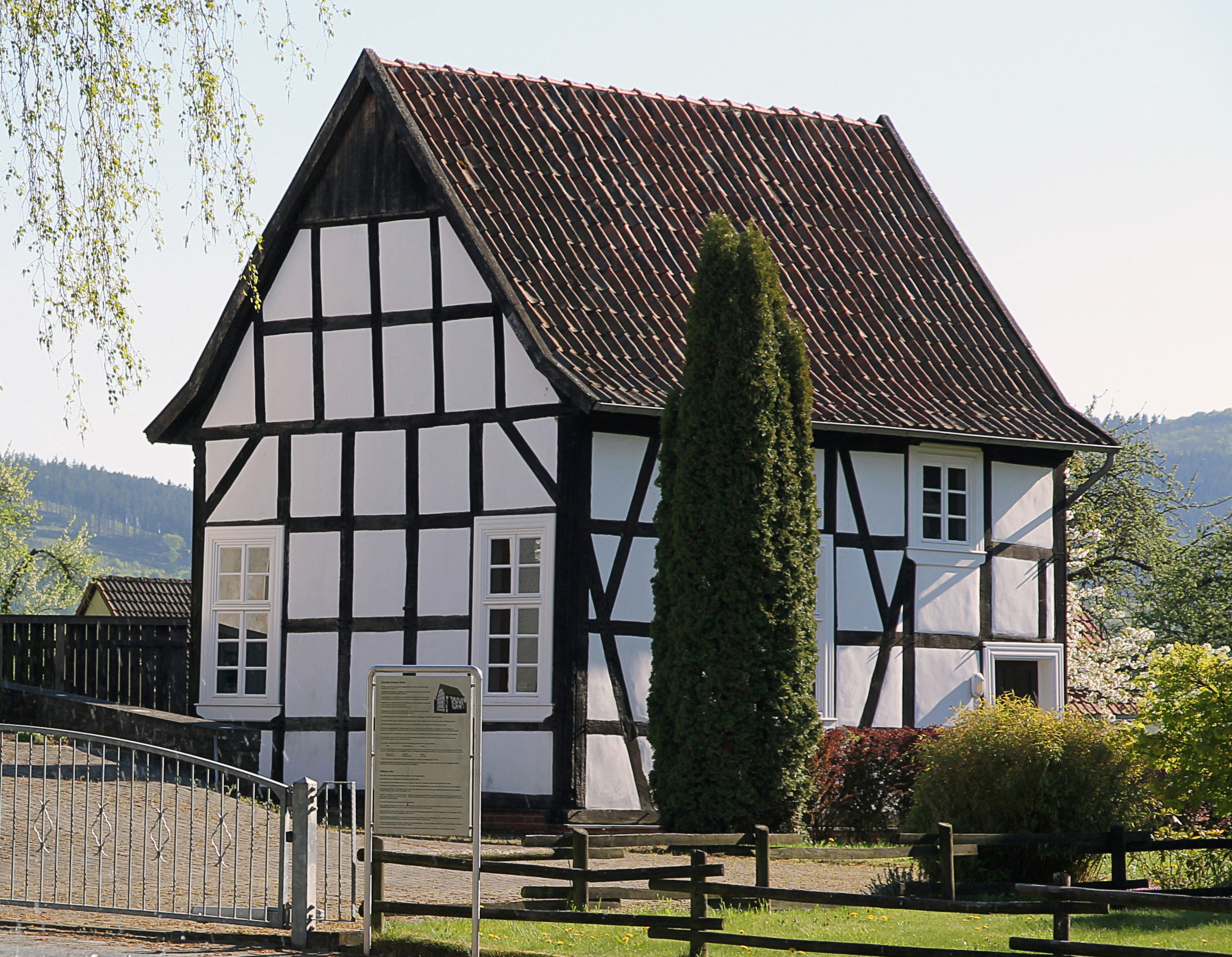 Ehemalige Synagoge Marsberg-Padberg, 2016 Älteste erhaltende Fachwerksynagoge in Westfalen This image shows a heritage building in Germany, located in the North Rhine-Westphalian city Marsberg (no. 23).